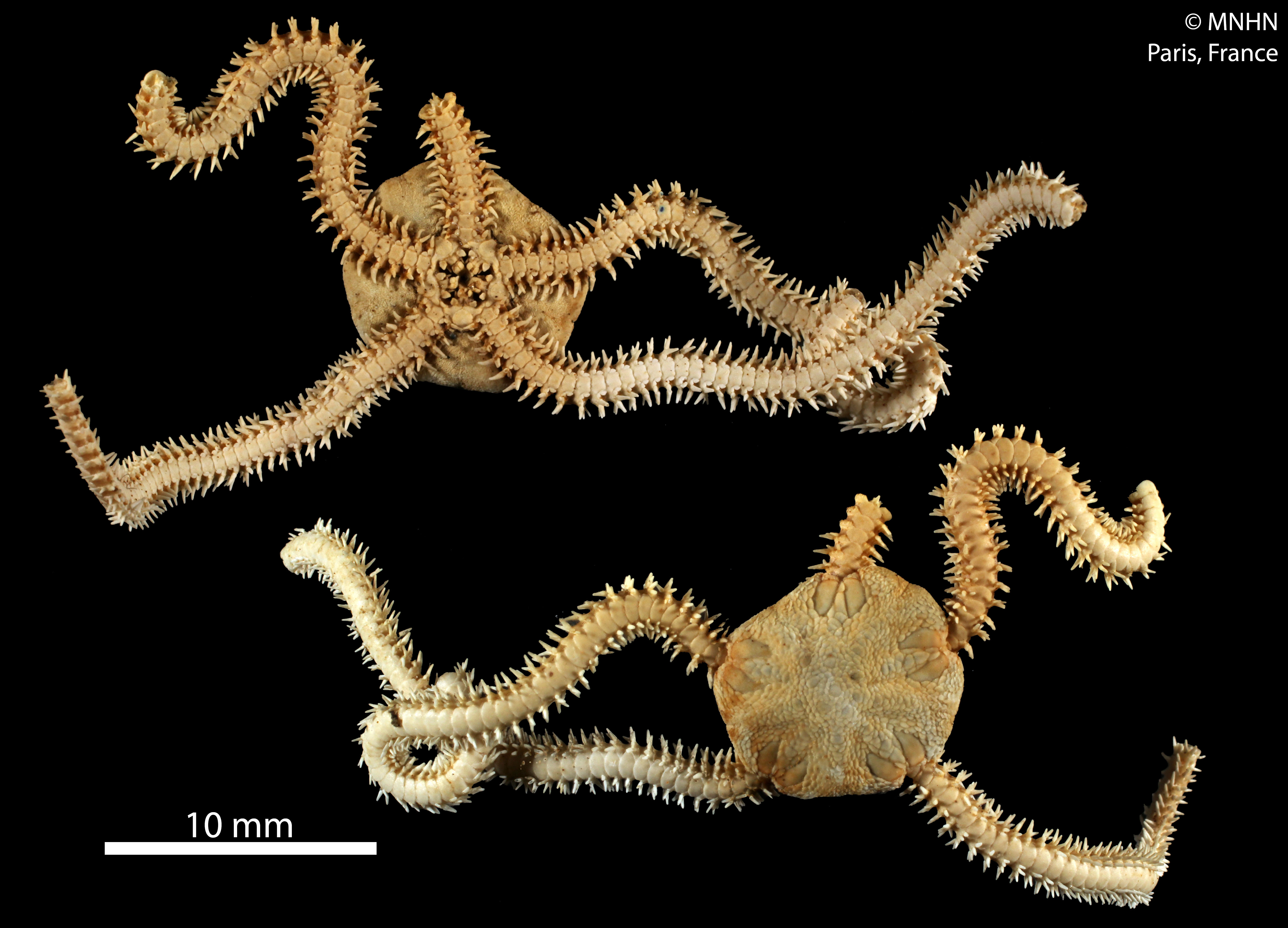 Amphiura callidaLot de 3 spécimens MNHN-IE-2013-10163Collection : Échinodermes (IE)Muséum National d'Histoire Naturelle (Paris, France) Origine : Libellé du pays : SUD-EST BRESIL Nom du collecteur : Bouchet, Leal & Métivier Expédition : MD55 (BRESIL) Navire : Marion Dufresne Type : Navire océanographique Numéro de station : 60-CB101 Date de récolte : 1987-06-01 Profondeur (mètres) : 50 Coordonnées géographiques : 22° 58' 0.0084 S 42° 5' 59.9928 O Localité type : South of Cabo Frio, Rio de Janeiro